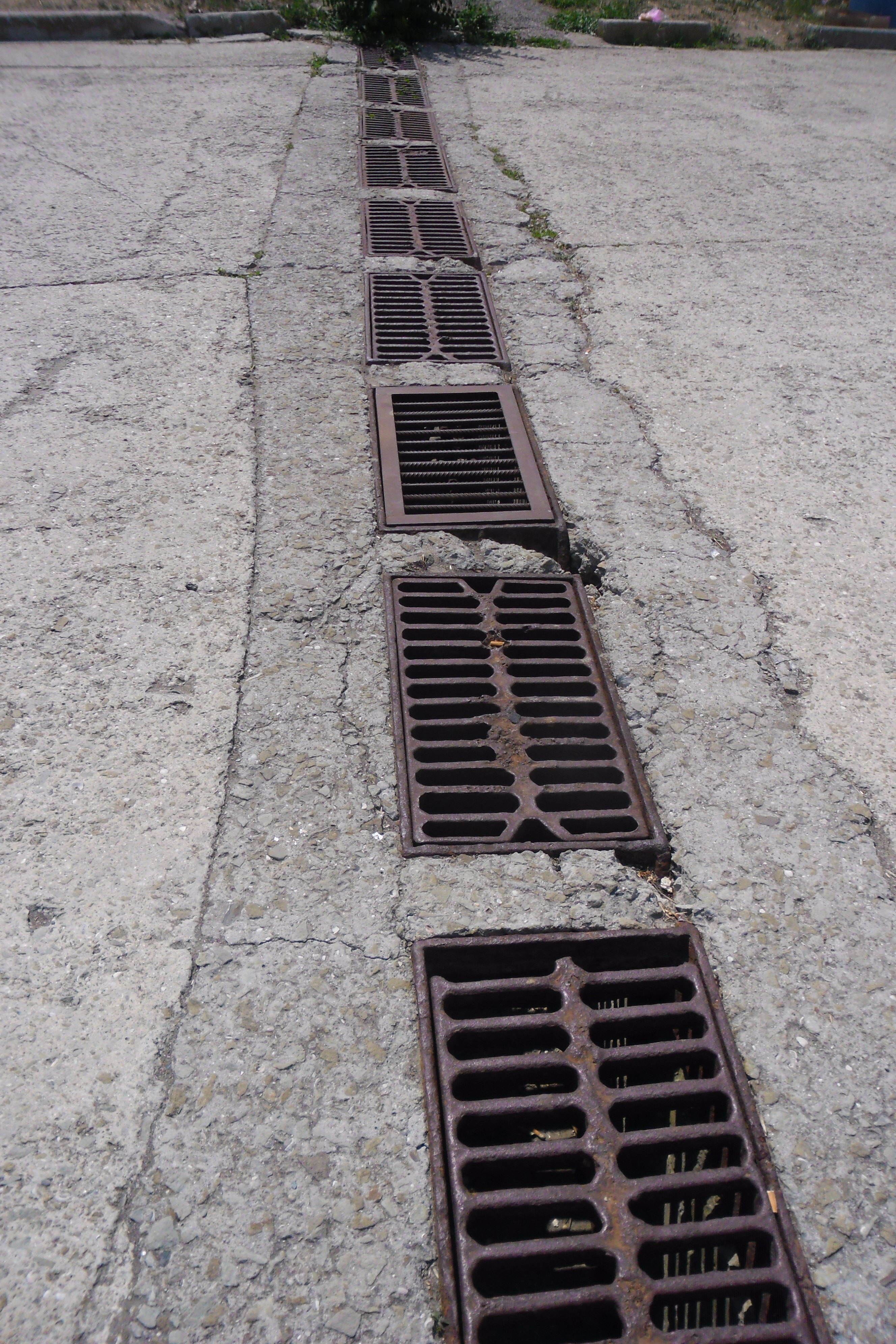 Дощоприймач